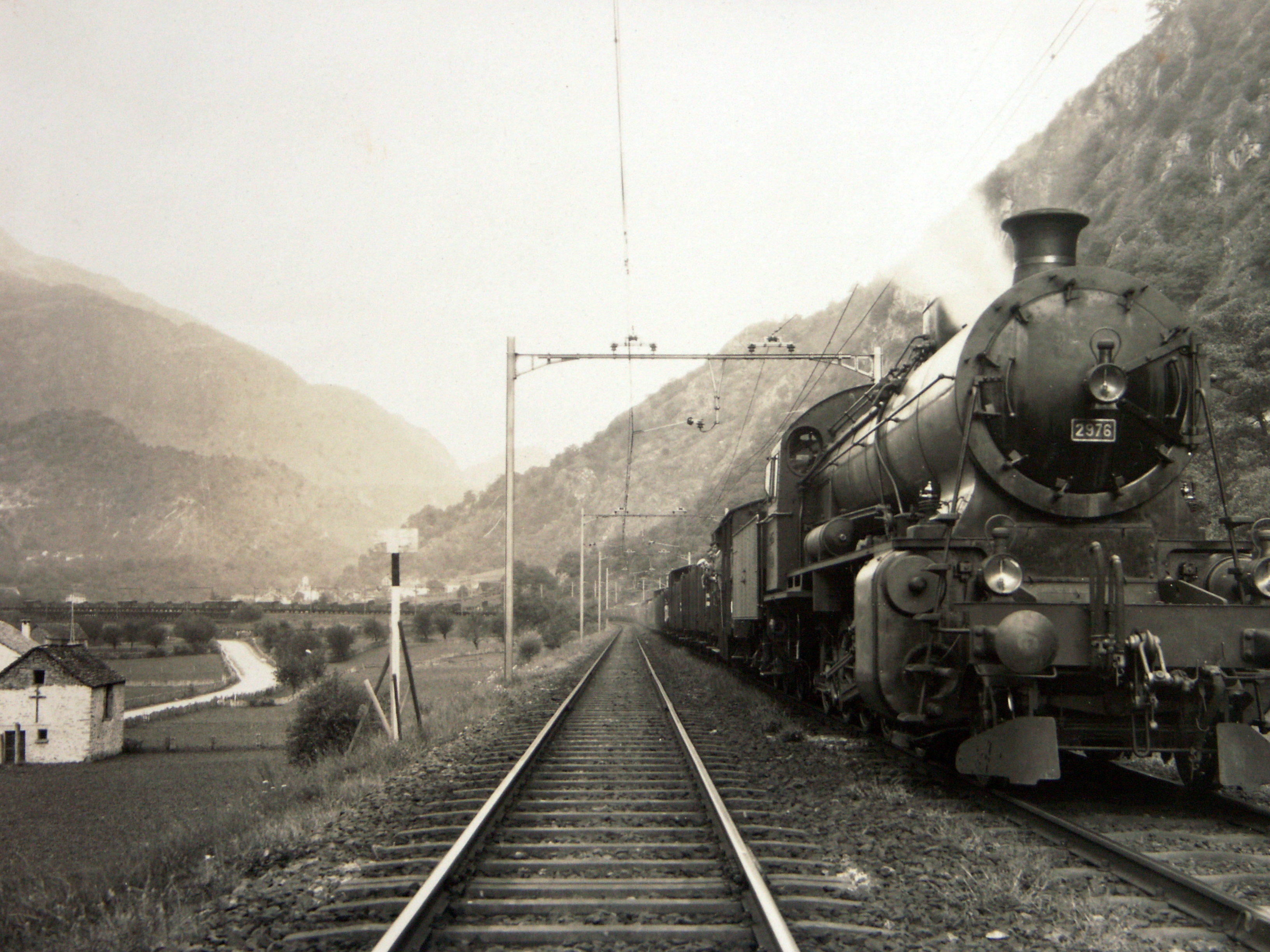 Versuchsfahrten mit der Drolshammer-Bremse